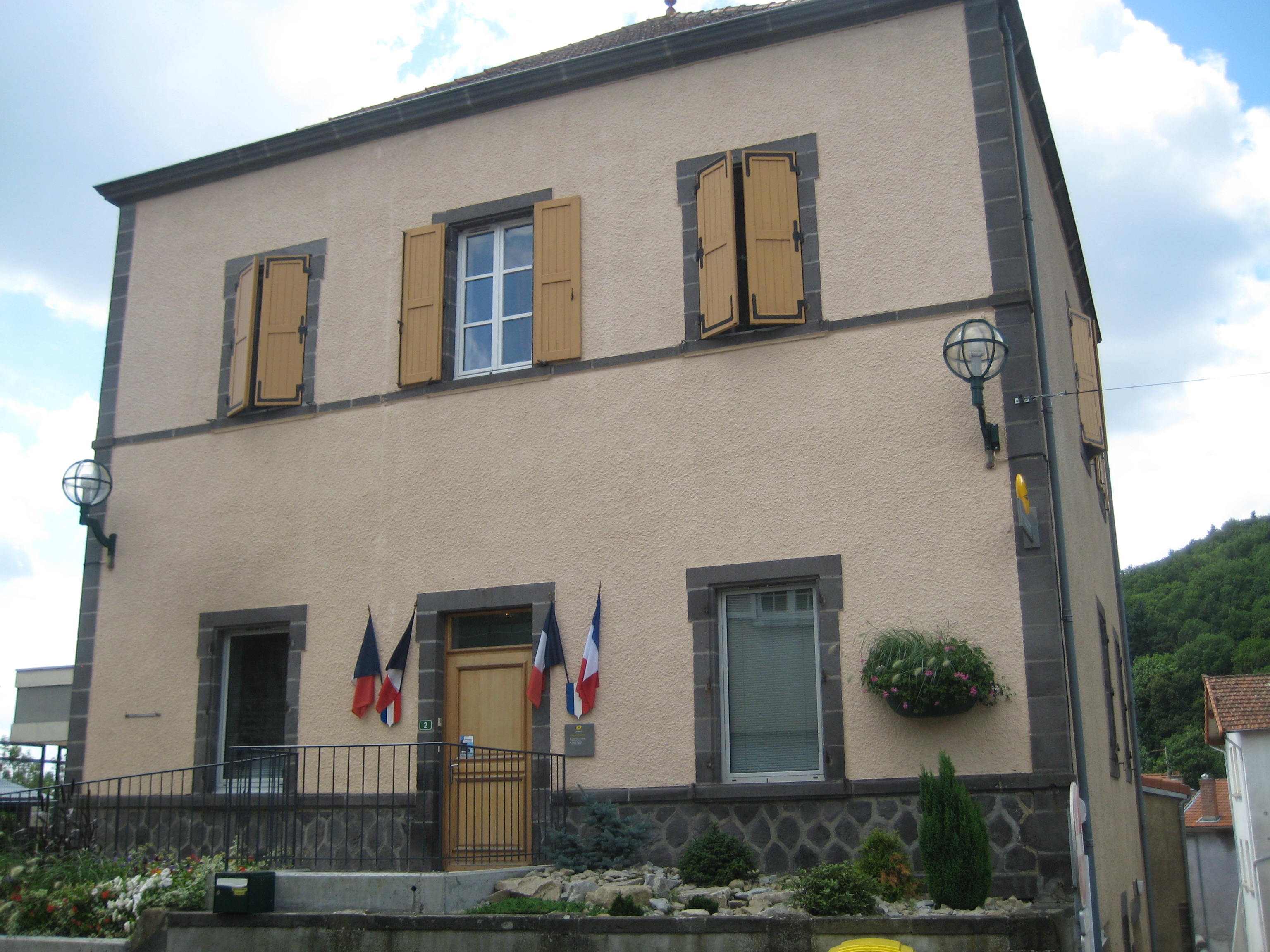 mairie d'Enval